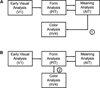 مشاهده شد که فایر کردن نورون های PIT باعث فایرکردن نورون های AIT شده و بعد یا ناحیه ی AIT مستقیما باعث فایر کردن نورون های V4 می شوند یا بعد ازاینکه PIT روی AIT تاثیر گذاشت، فعالیت آن باعث تاثیر روی V4 می شود.